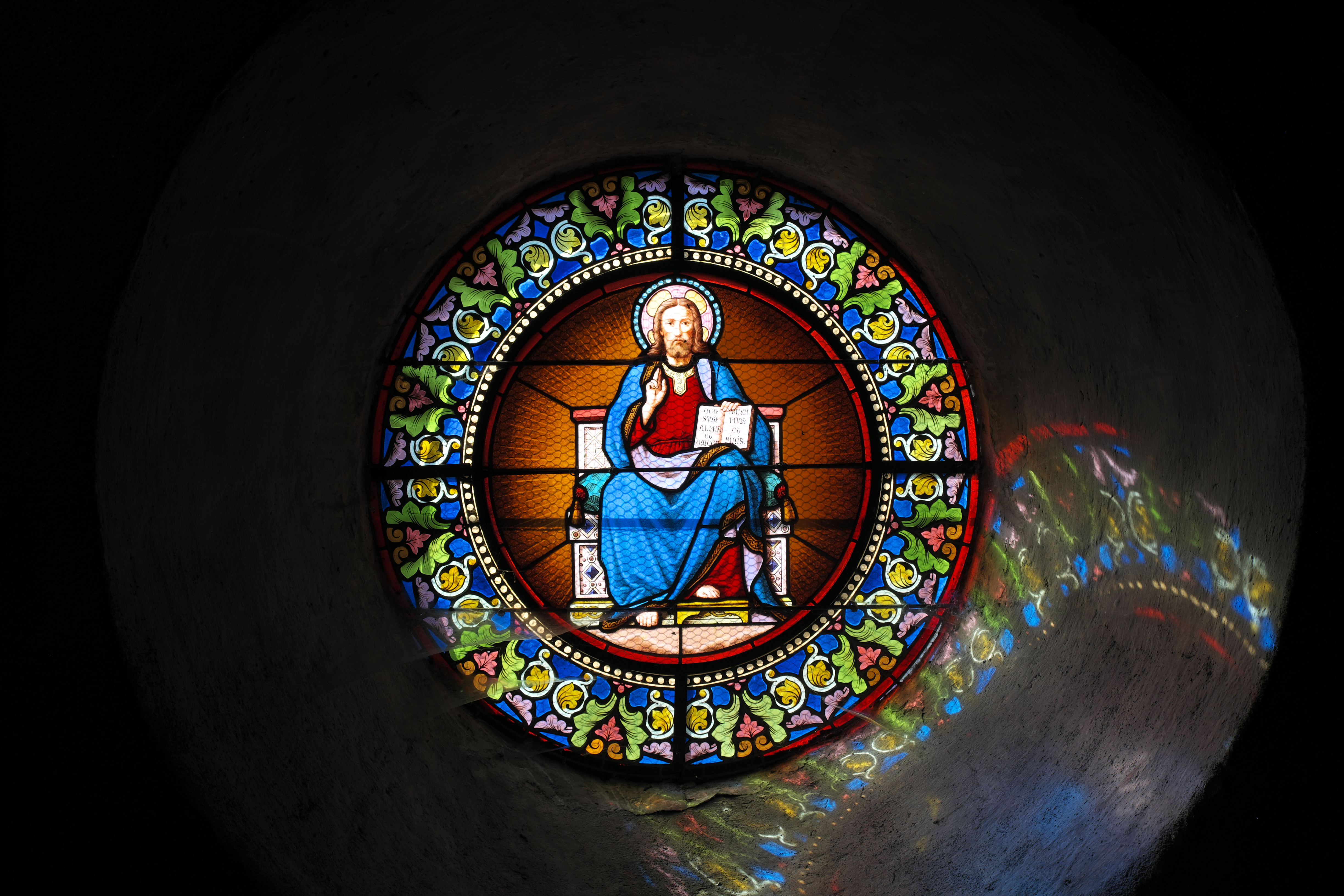 Kirche Saint-Hippolyte in Jaligny-sur-Besbre im Département Allier (Auvergne-Rhône-Alpes/Frankreich), Bleiglasfenster, Darstellung: Majestas Domini